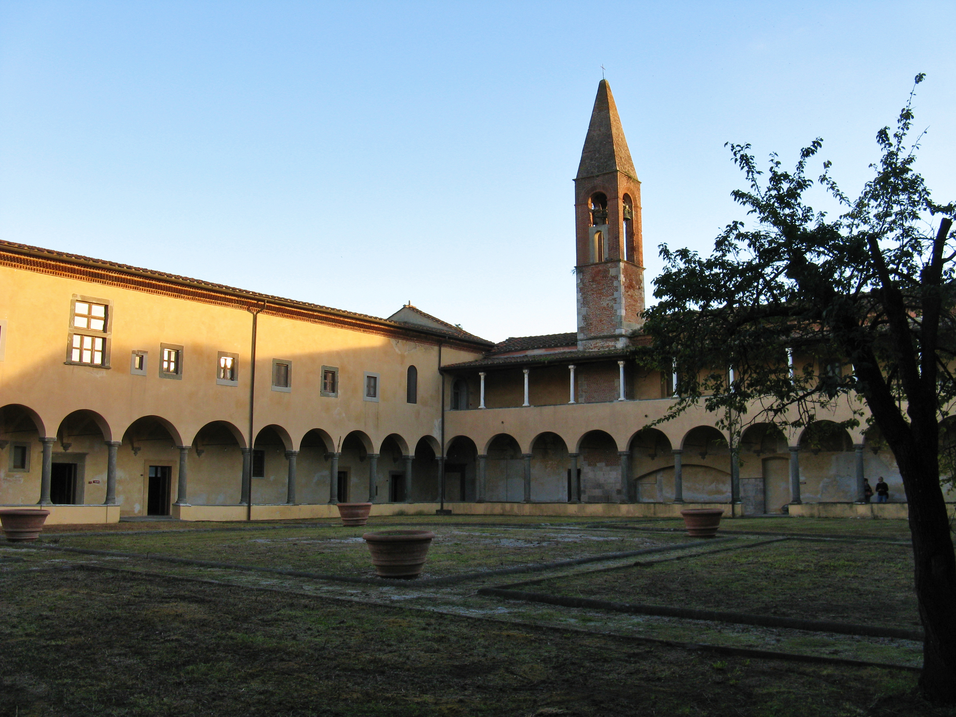 Chiostro del convento di Santa Croce in Fossabanda, Pisa